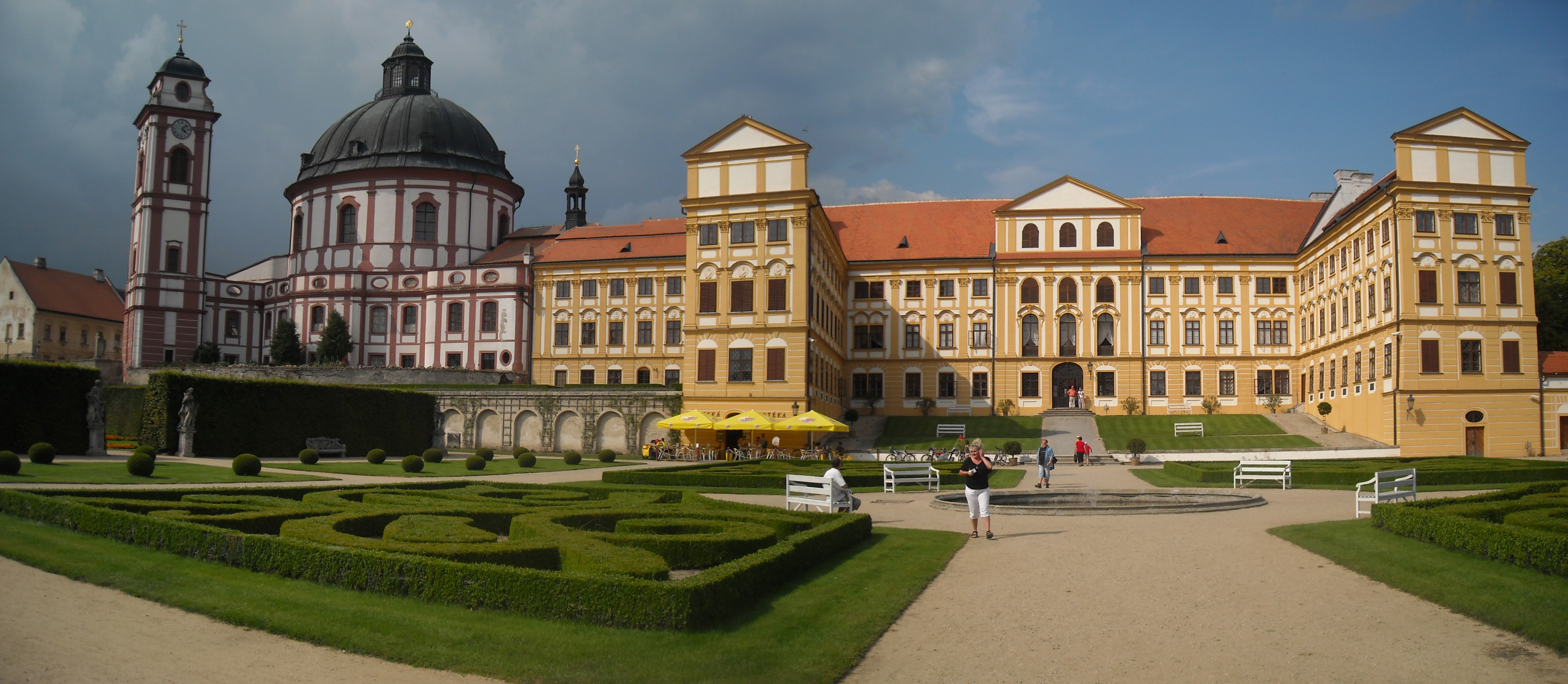 Pohled na zámek Jaroměřice nad Rokytnou ze zámeckého parku.